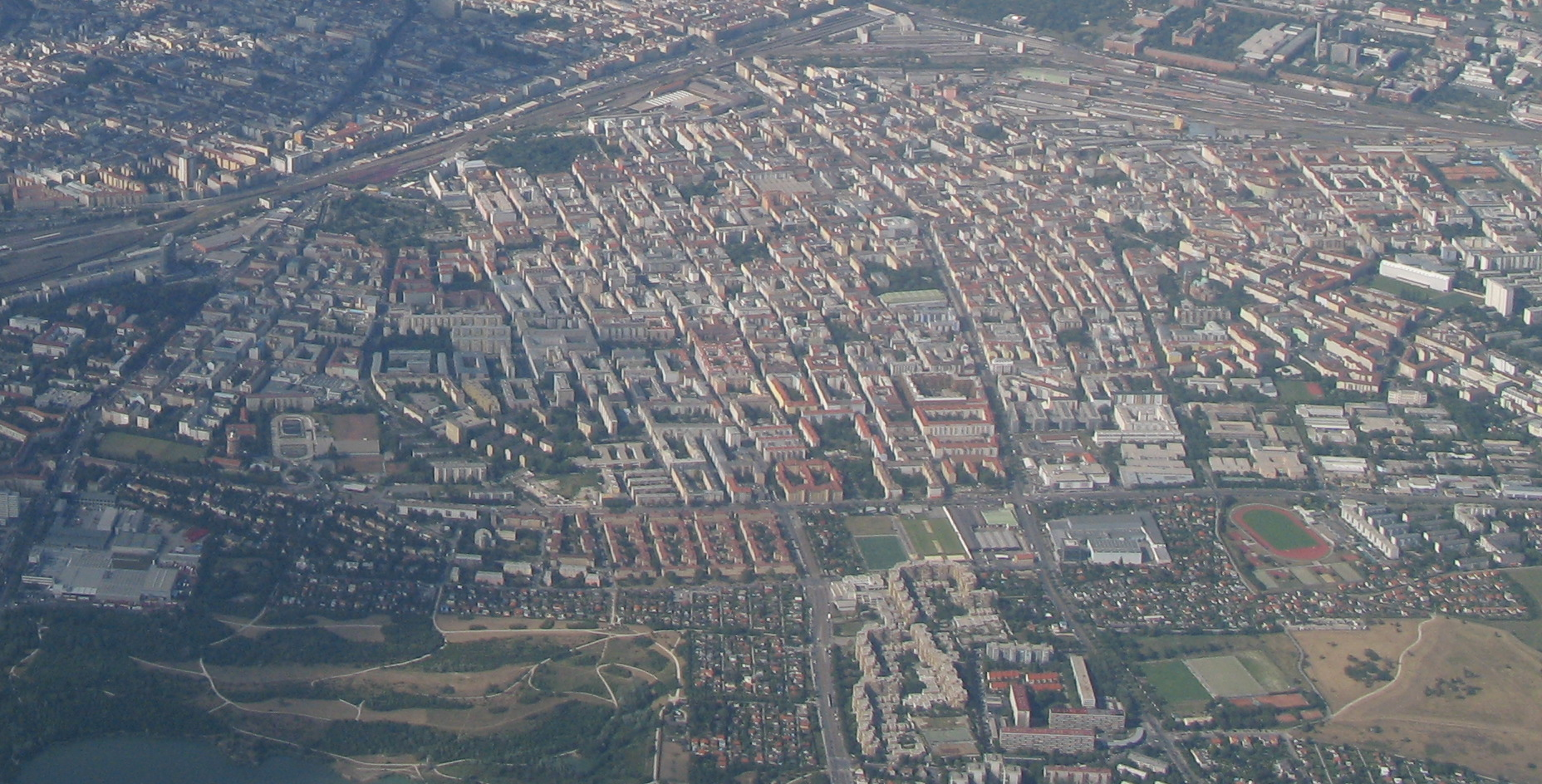 Favoriten, Vienna, Austria